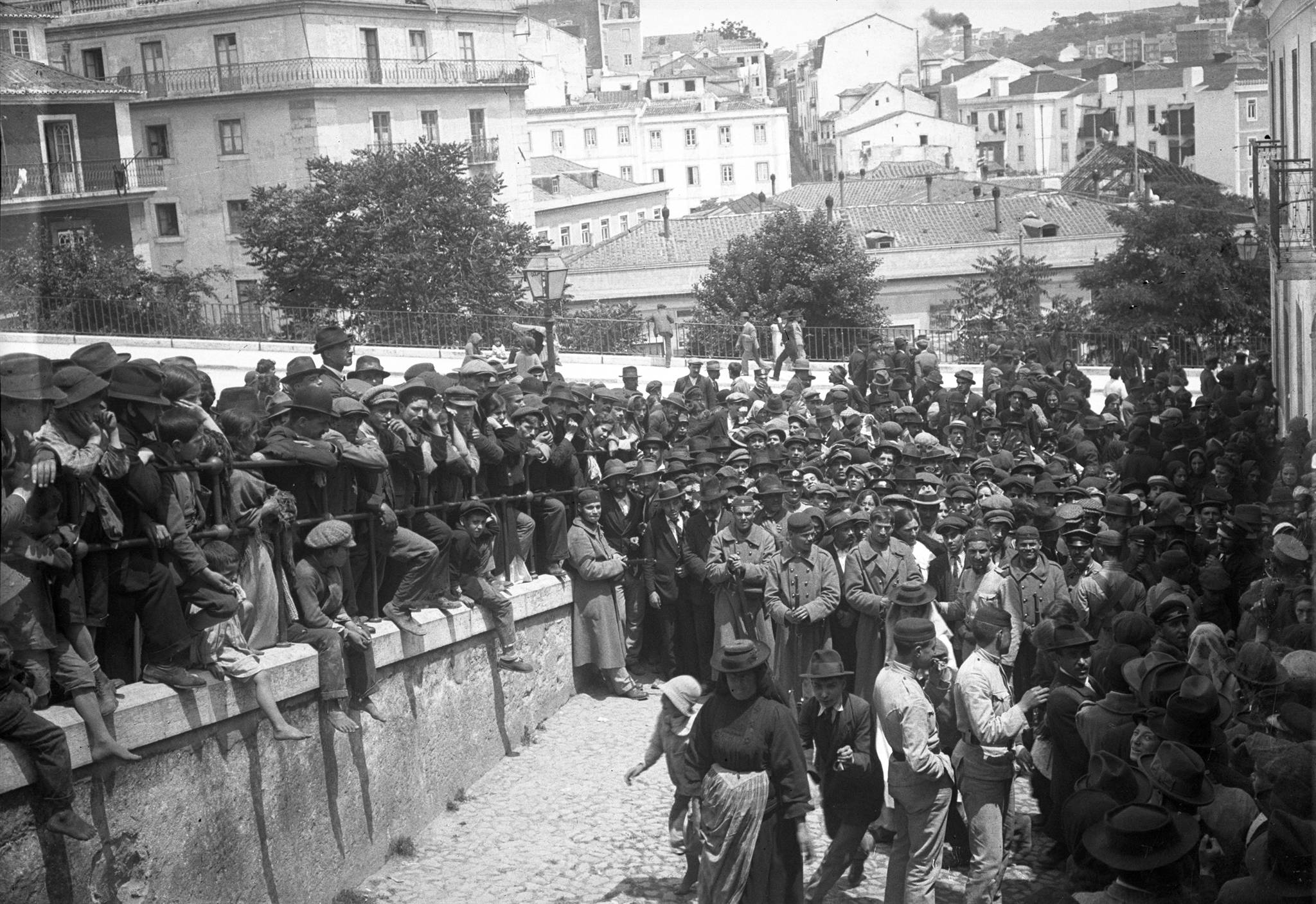 Morte de Miguel Bombarda, populares à porta do Instituto de Medicina Legal - Rua Manuel Bento de Sousa (Pena) (Ref: A8937)